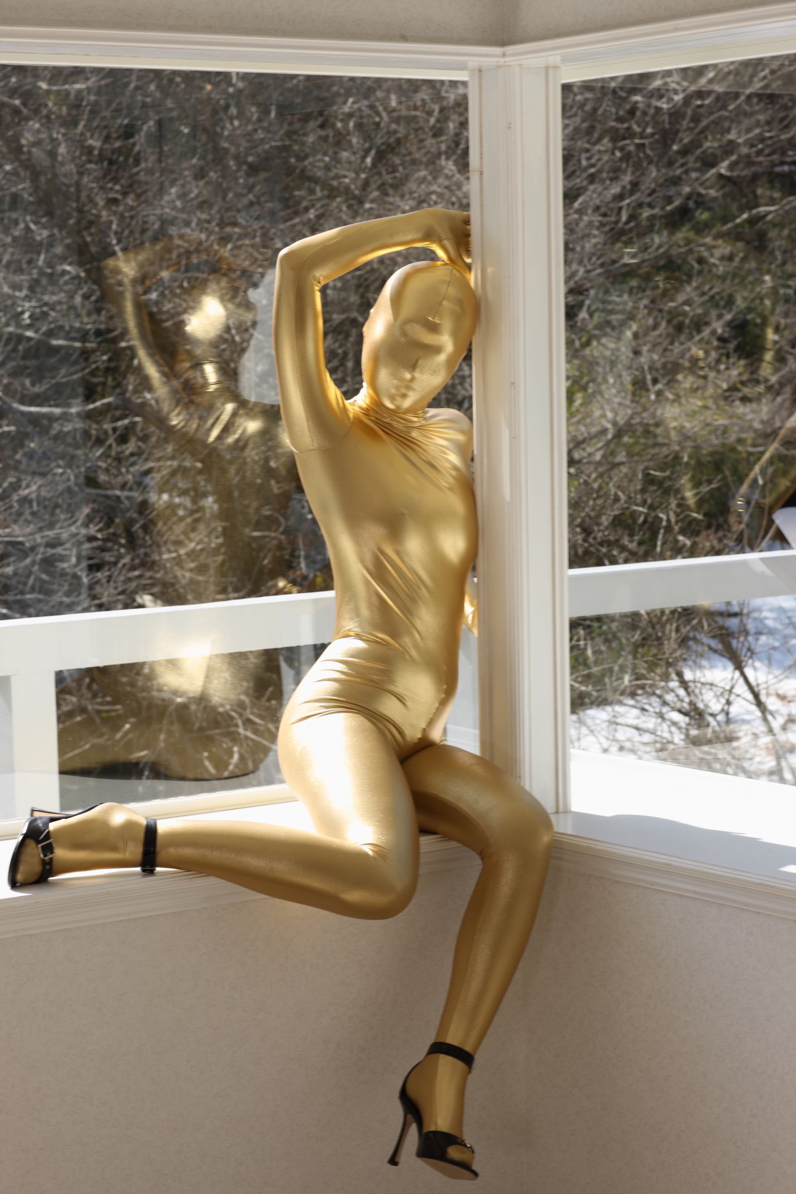 Gold Zentai